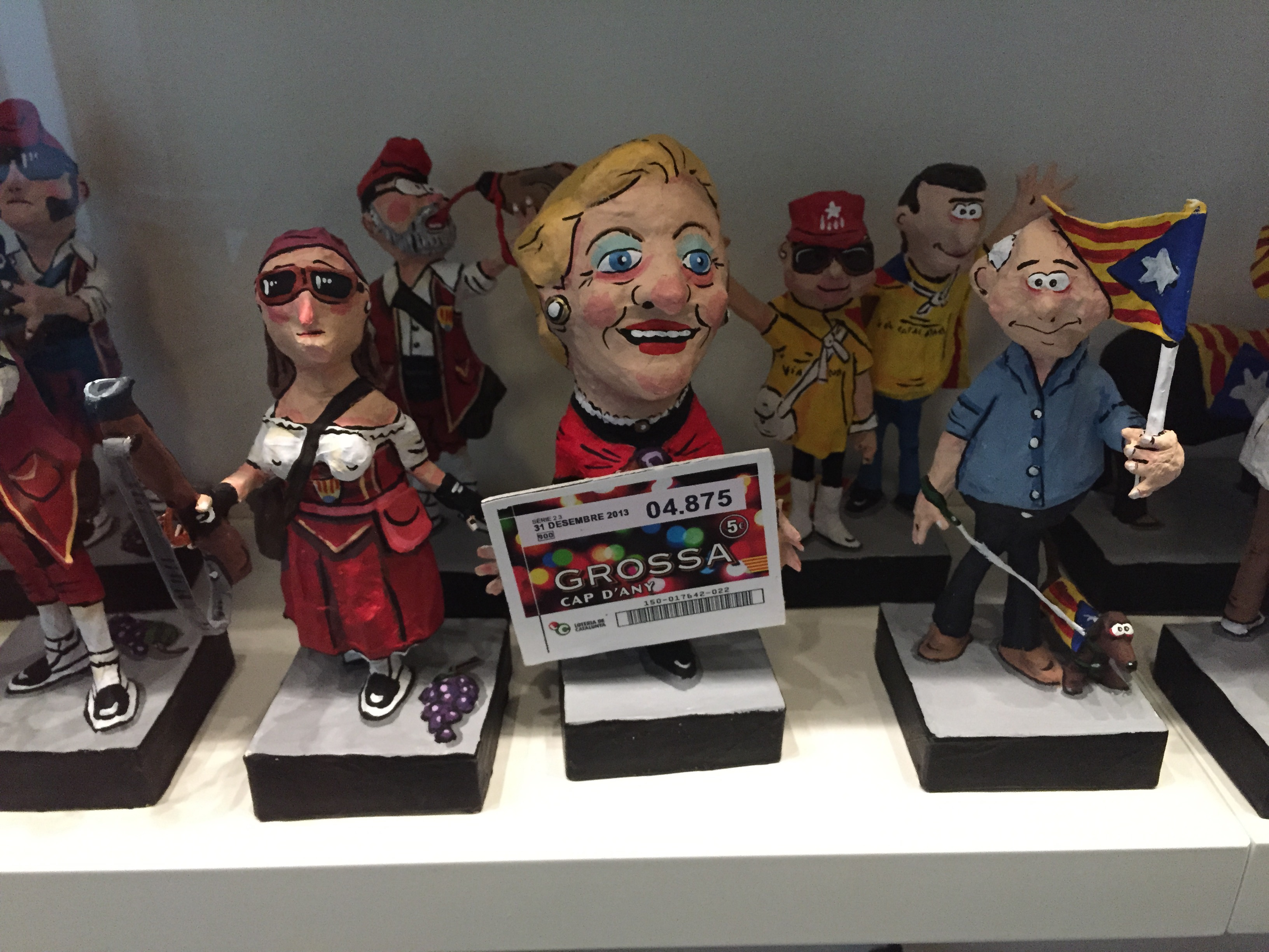 Sales renovades del Museu etnològic de Barcelona octubre 2015